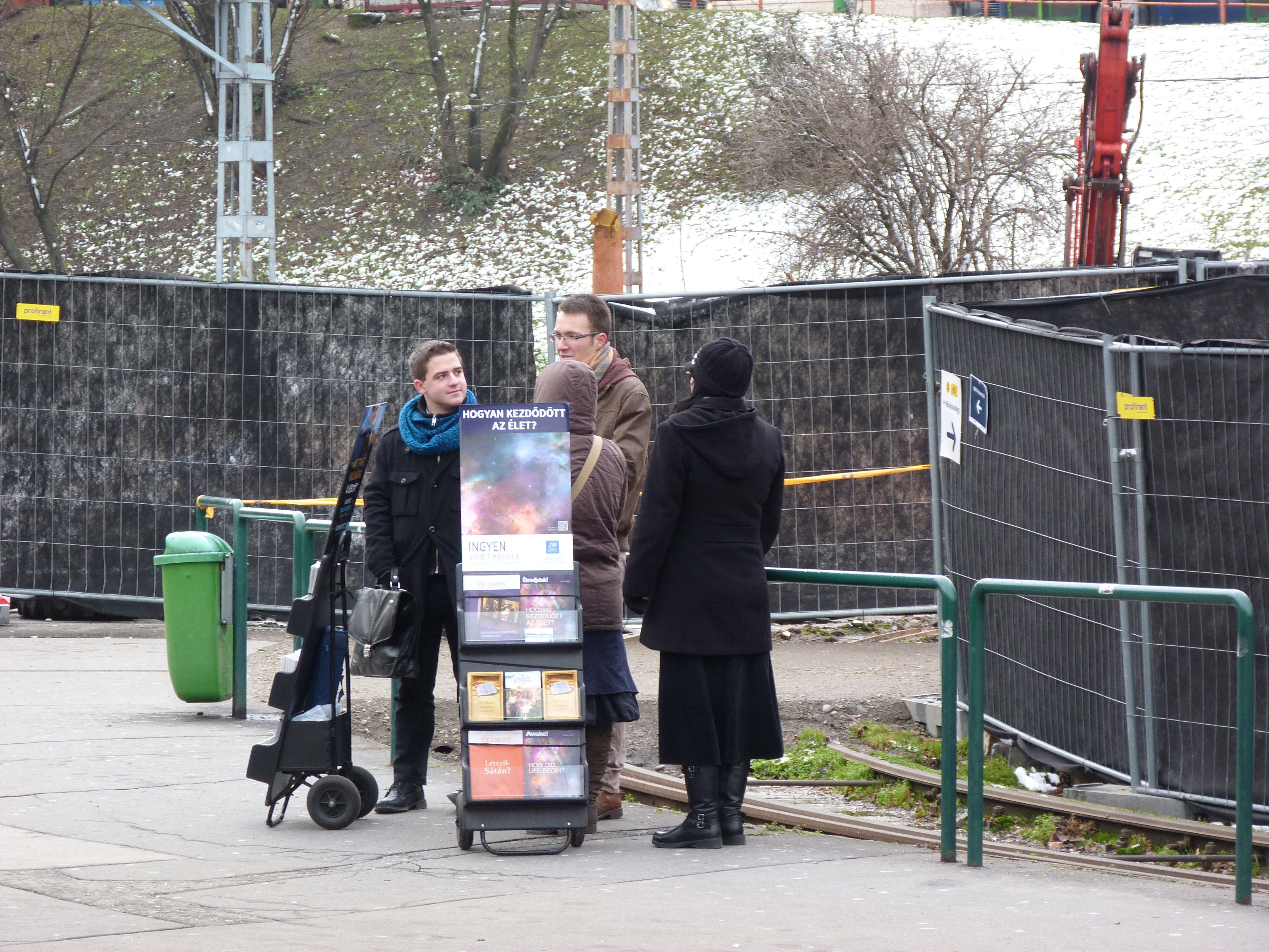 A felvétel 2015. január 26-án készült Budapesten, a Széll Kálmán téren. Megkezdődött az átépítés. Őrtorony. ©© Derzsi Elekes Andor, Budapest, 2015, A kép egészben, vagy részletekben másolását, bármilyen úton történő sokszorosítását és felhasználását a szerző ellenérték nélkül, jogutódjaira is kihatóan megengedi. Az engedély kiterjed a kereskedelmi célú hasznosításra is. Kéri azonban nevének feltüntetését a felhasználás során. A Metapolisz sorozat valamennyi képe és filmje Creative Commons alatti valamint kereskedelmi - for profit - célra is felhasználható. Ajánlott hivatkozás: Derzsi Elekes Andor: Metapolisz DVD line